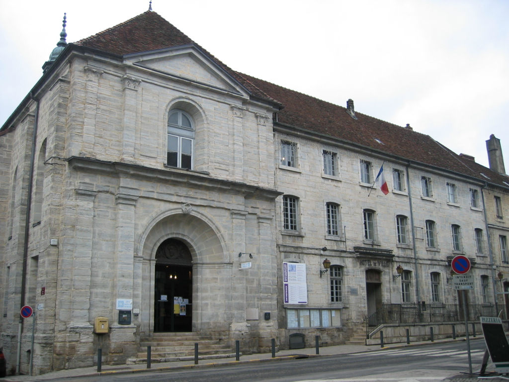 Hotel de ville et syndicat d'initiative - Arbois - Jura - France